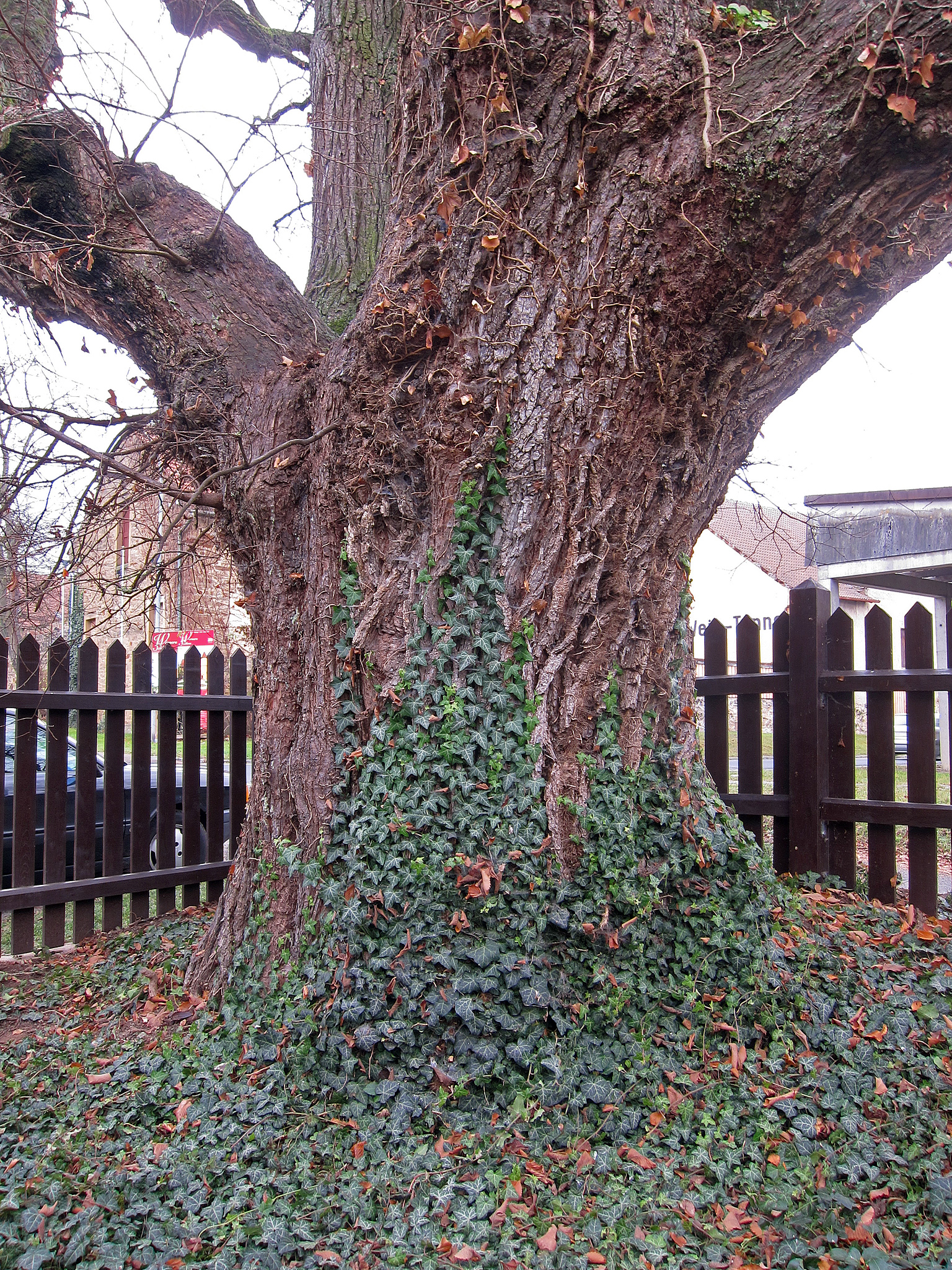 Ulme Neuses am Sand